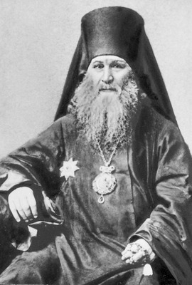 Герасим (Добросердов), еп. Фотография. 60-70-е гг. XIX в.